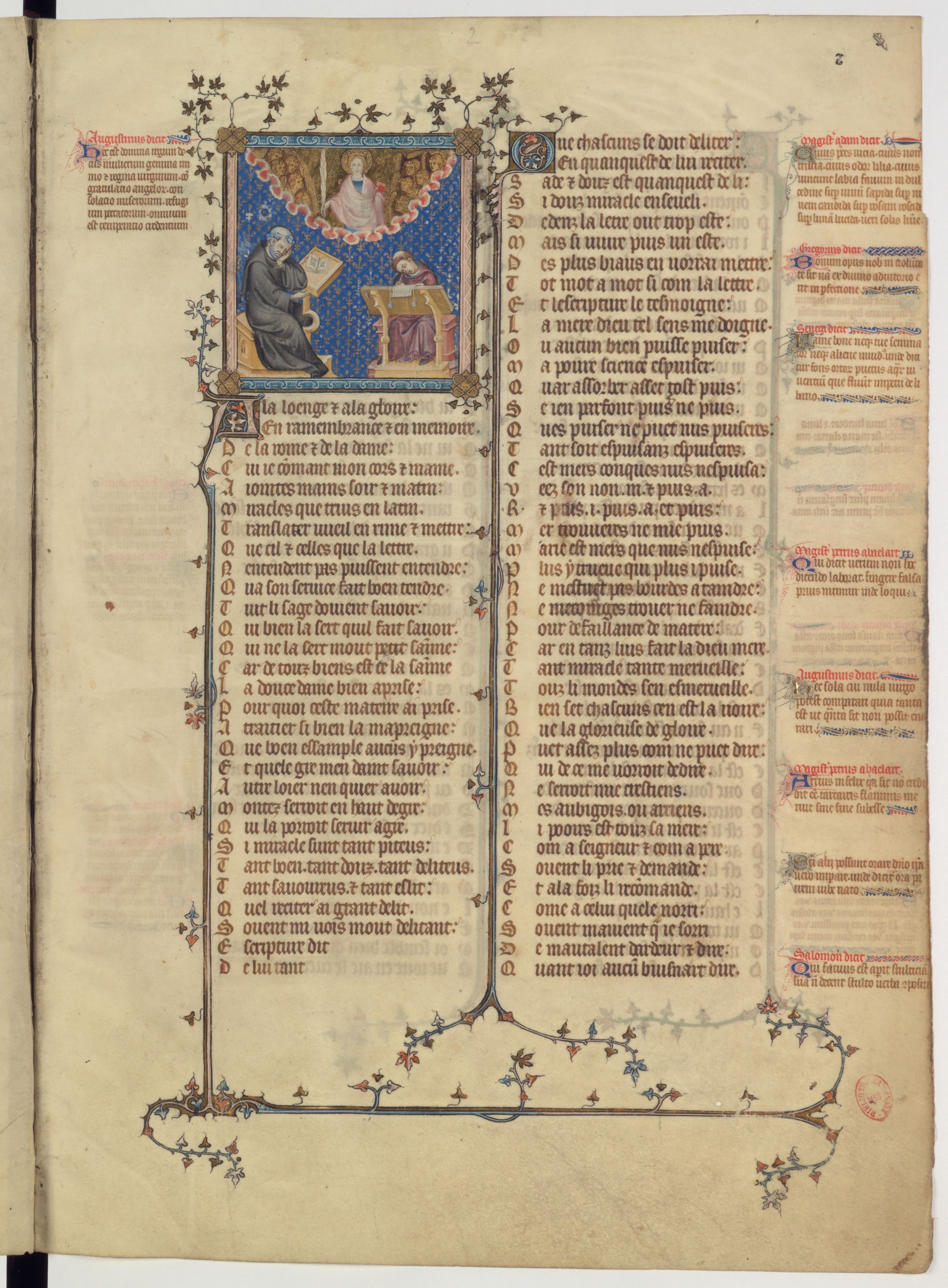 Les miracles Nostre Dame (ms. BnF, fr. 1546, inc. et expl.) entre 1214 et 1236 - Vers octosyllabiques à rimes plates de Gautier de Coincy